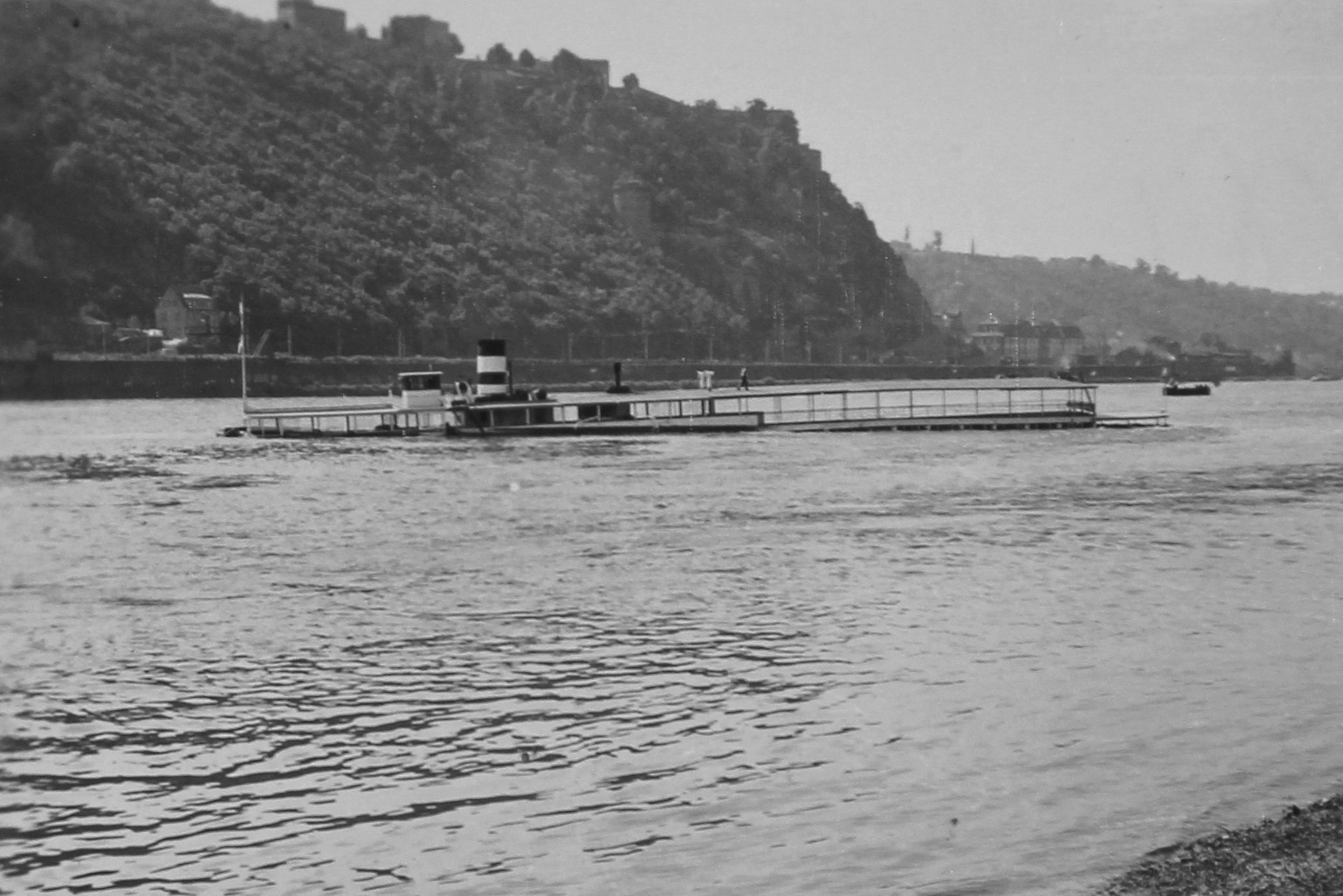 Dampfer Mainz nach der Havarie vom 12. Juni 1956 in Koblenz (Reproduktion einer 6x6-Kontaktkopie)